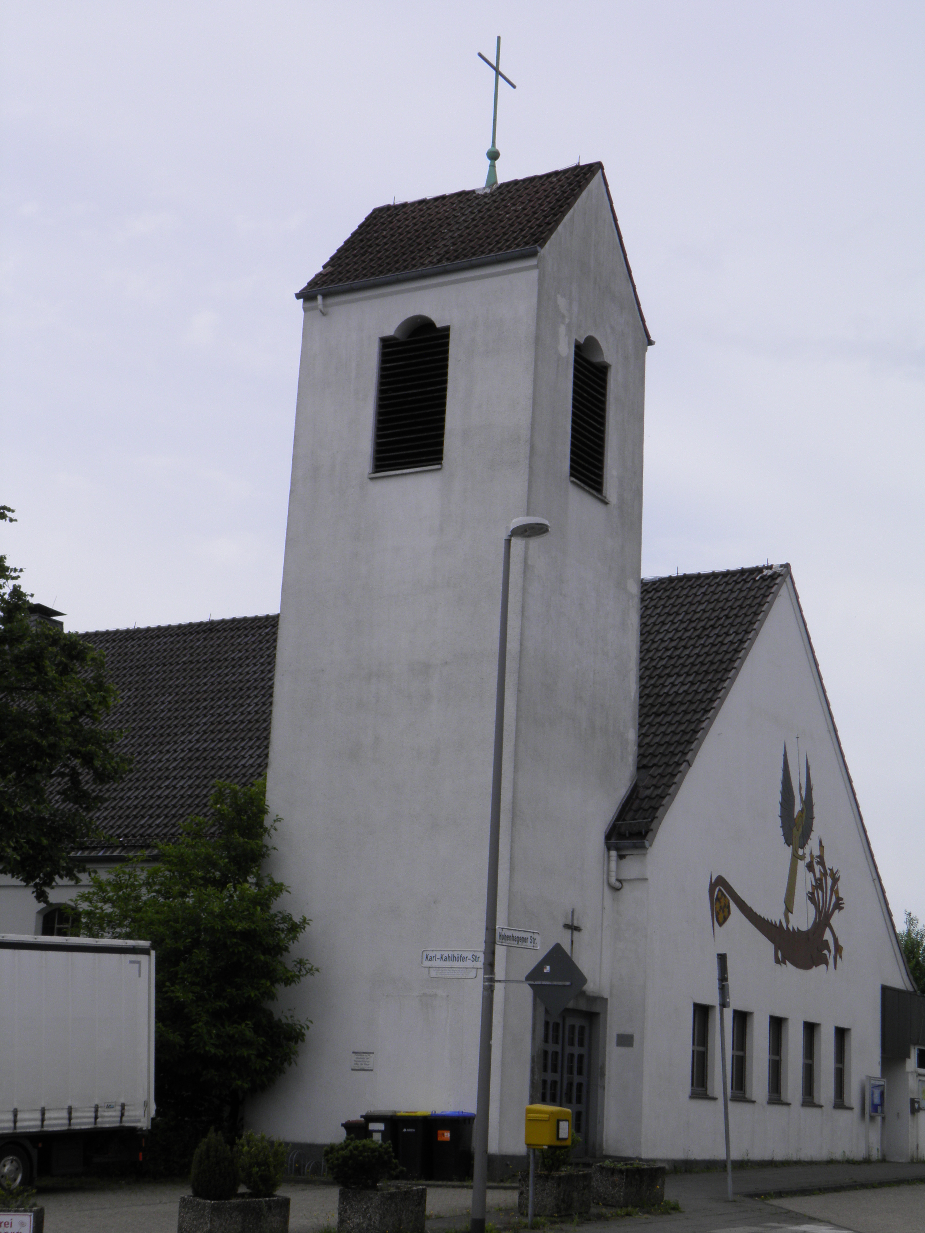 Hohenhagen Johanneskirche